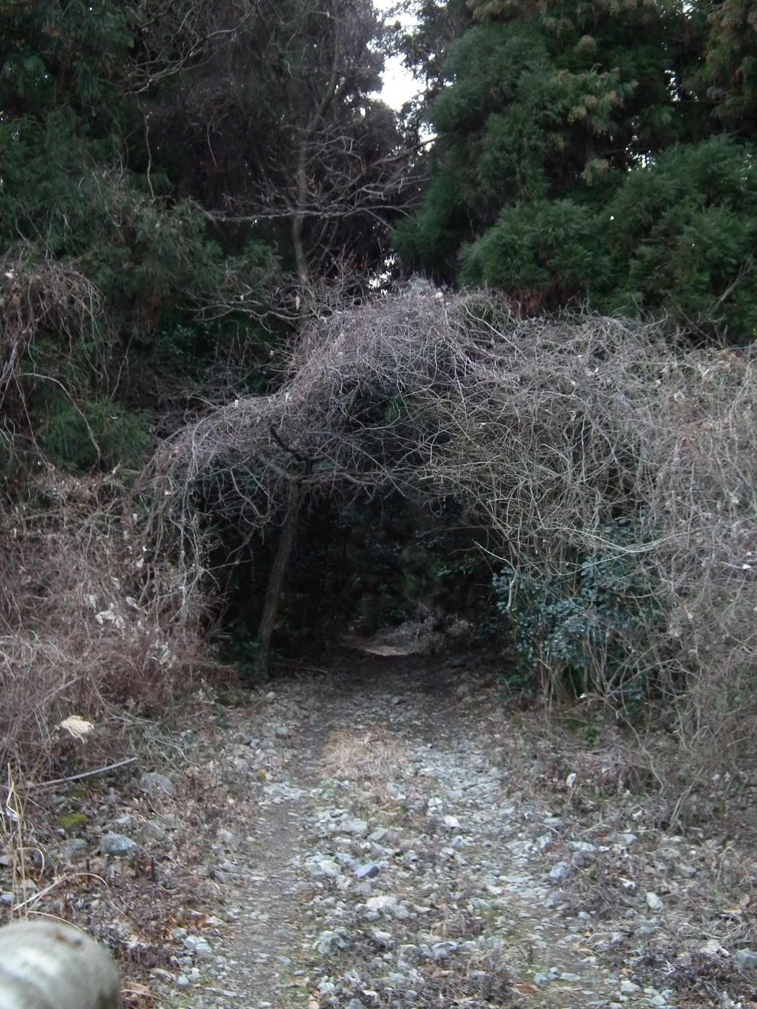 Road to Bonten fall Yamada-cho Kobe 梵天滝（チョンチョン滝）神戸市山田町への道